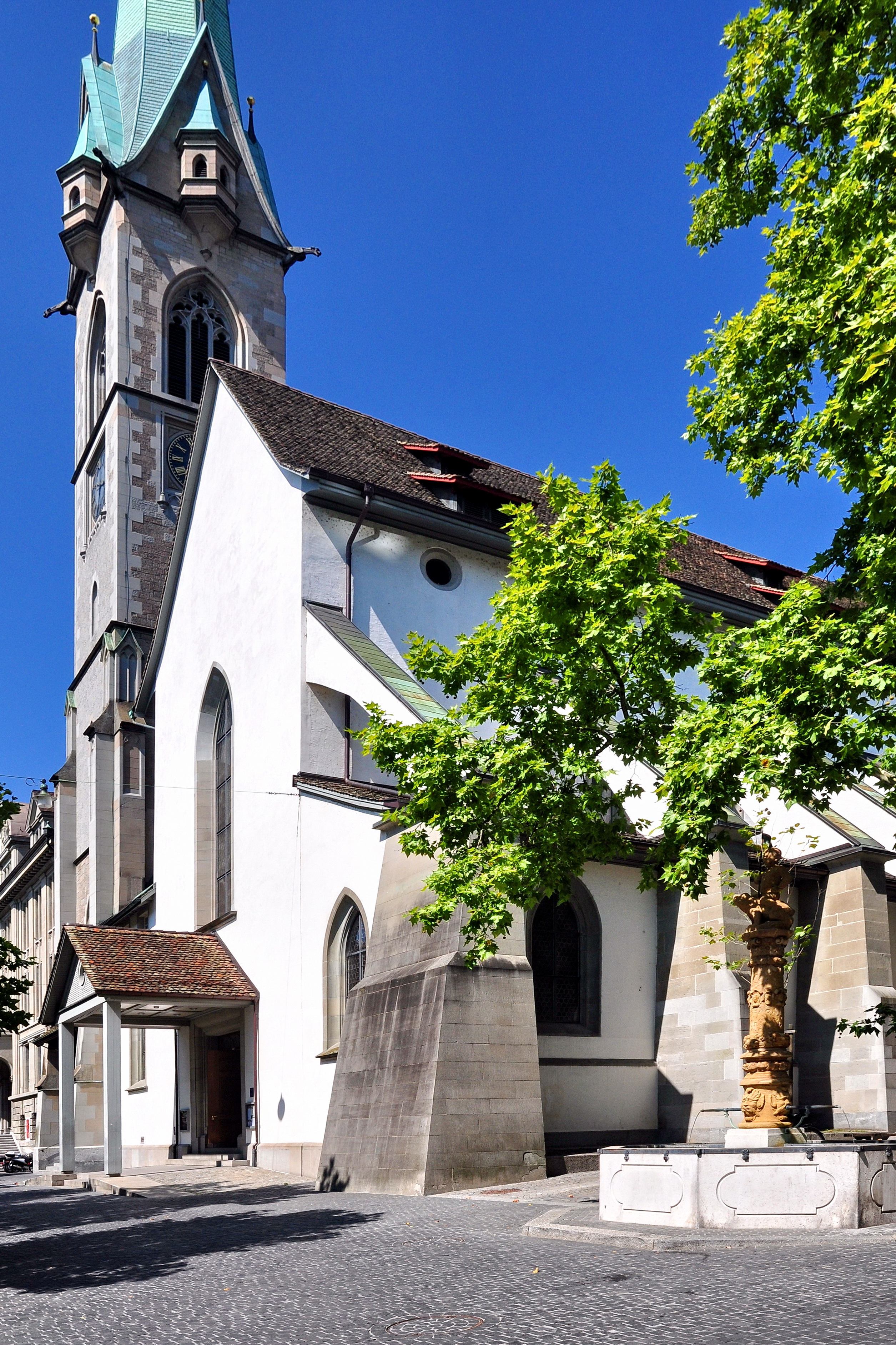 Prediger Church and Zentralbibliothek in Zürich-Rathaus quarter (Switzerland), Zähringerplatz to the left, Predigerplatz to the right.